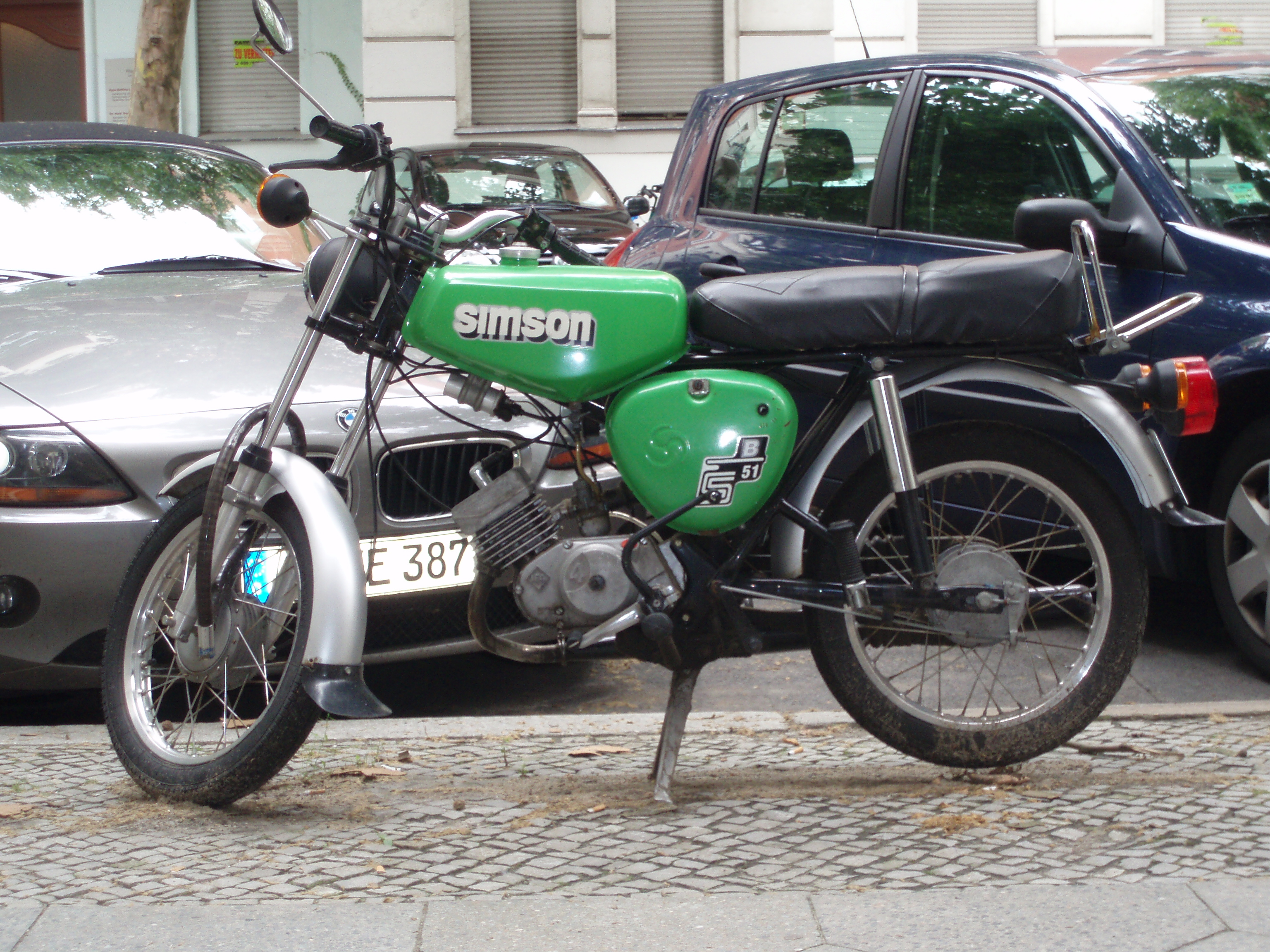 Green Simson S51B, Berlin, Germany.